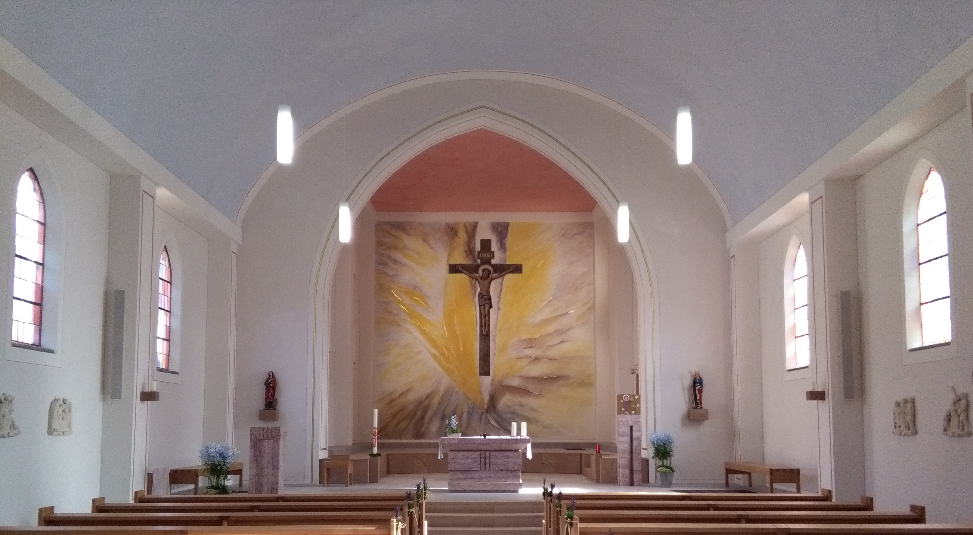 St. Johannes Evangelist Gernsdorf, Altar und Chorraum der Kirche